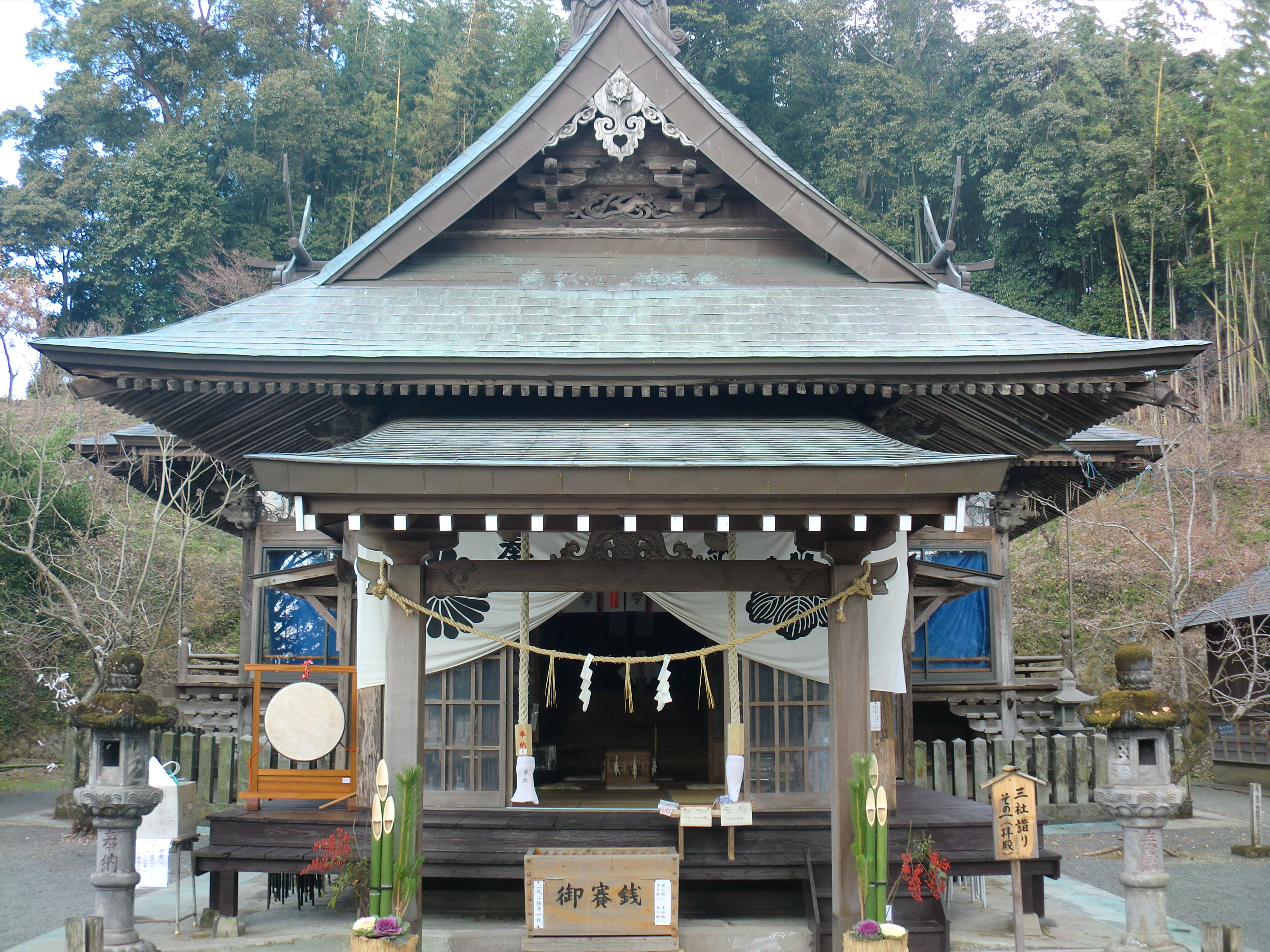 熊本県上益城郡益城町にある津森（つもり）神宮